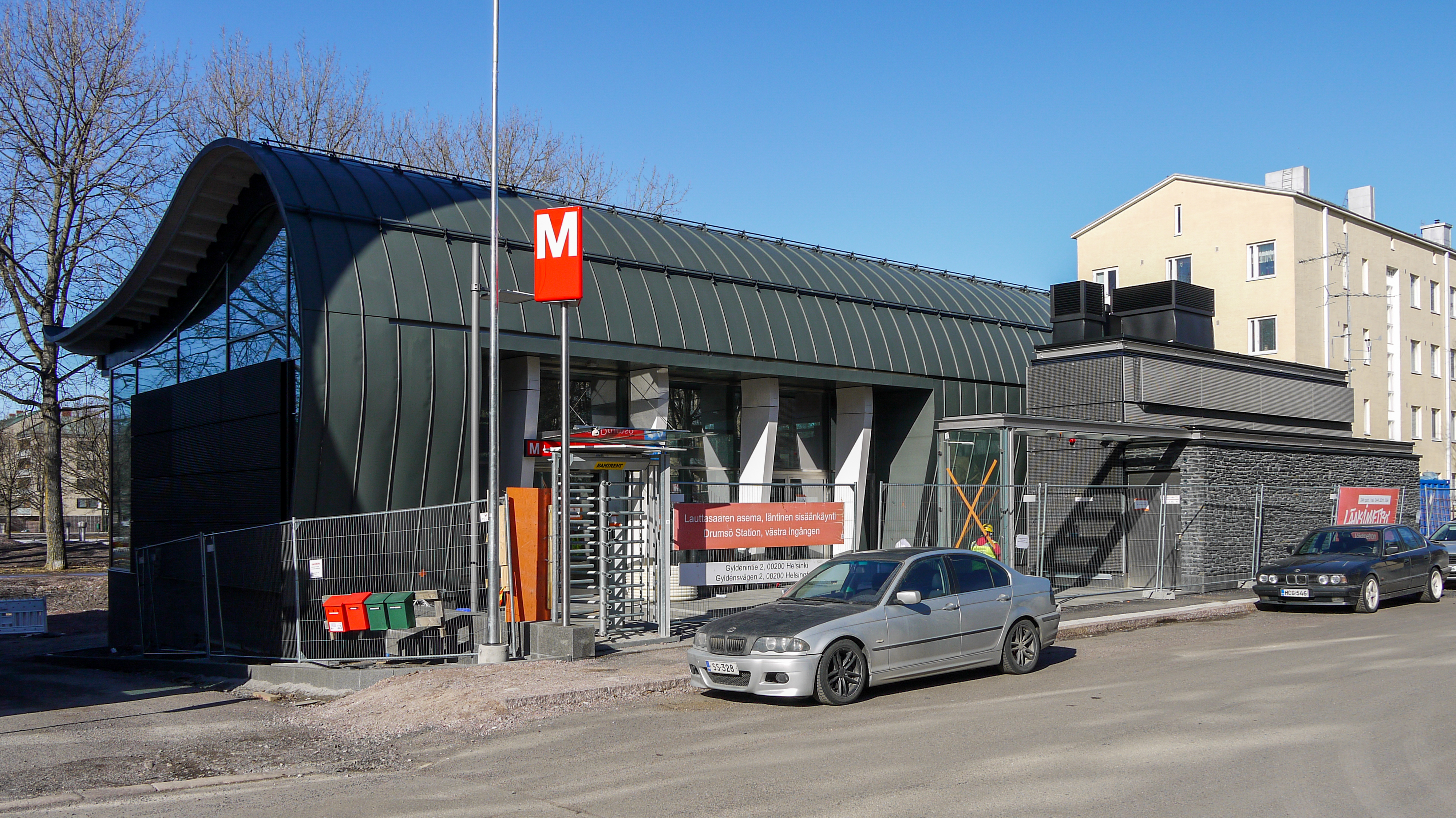 Lauttasaaren metroaseman läntinen sisäänkäynti maaliskuussa 2017.